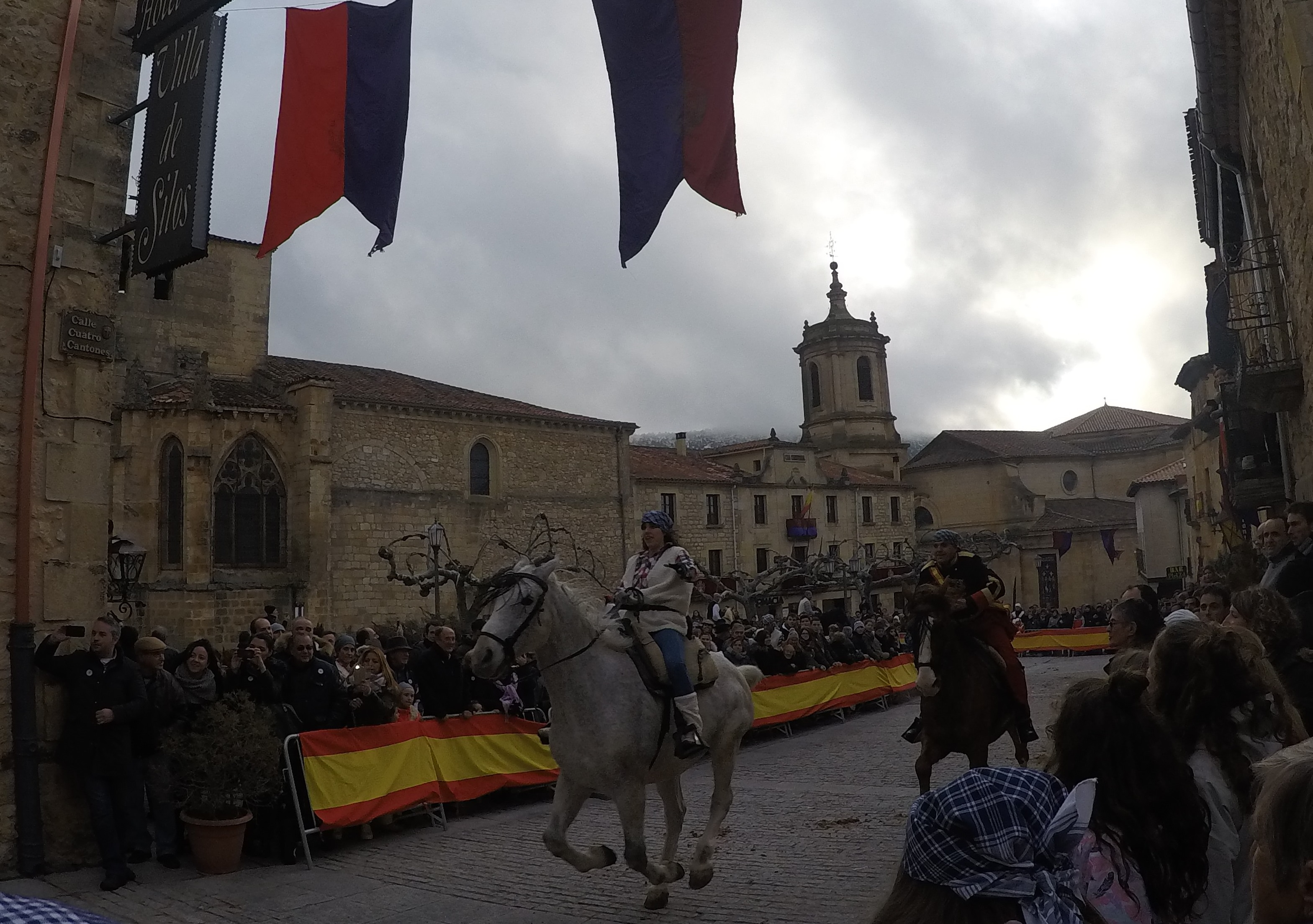 Jinete en Las Crestas , durante la celebración de la Fiesta de los Jefes